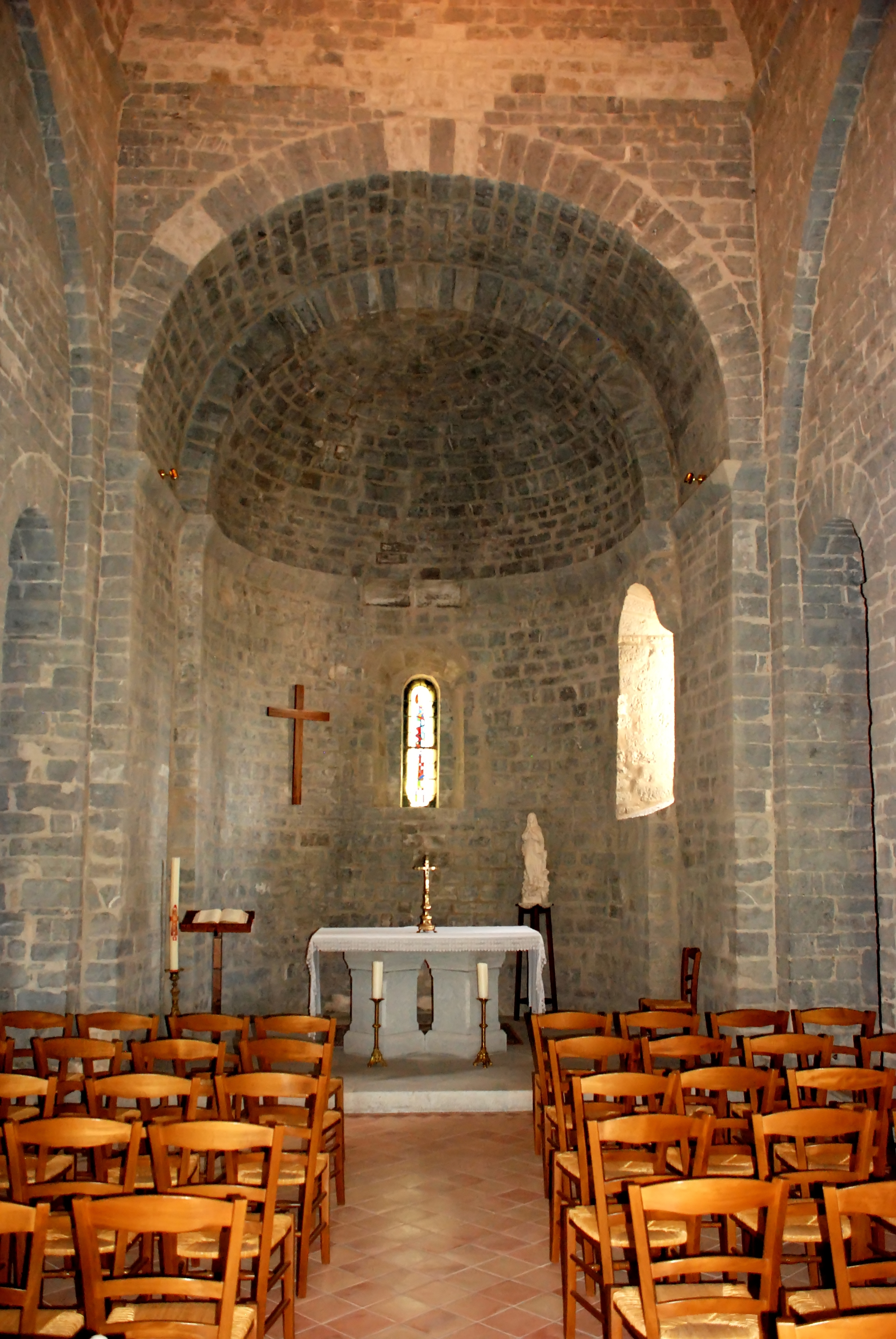 France - Gard - Église Saint-Baudile de Tornac